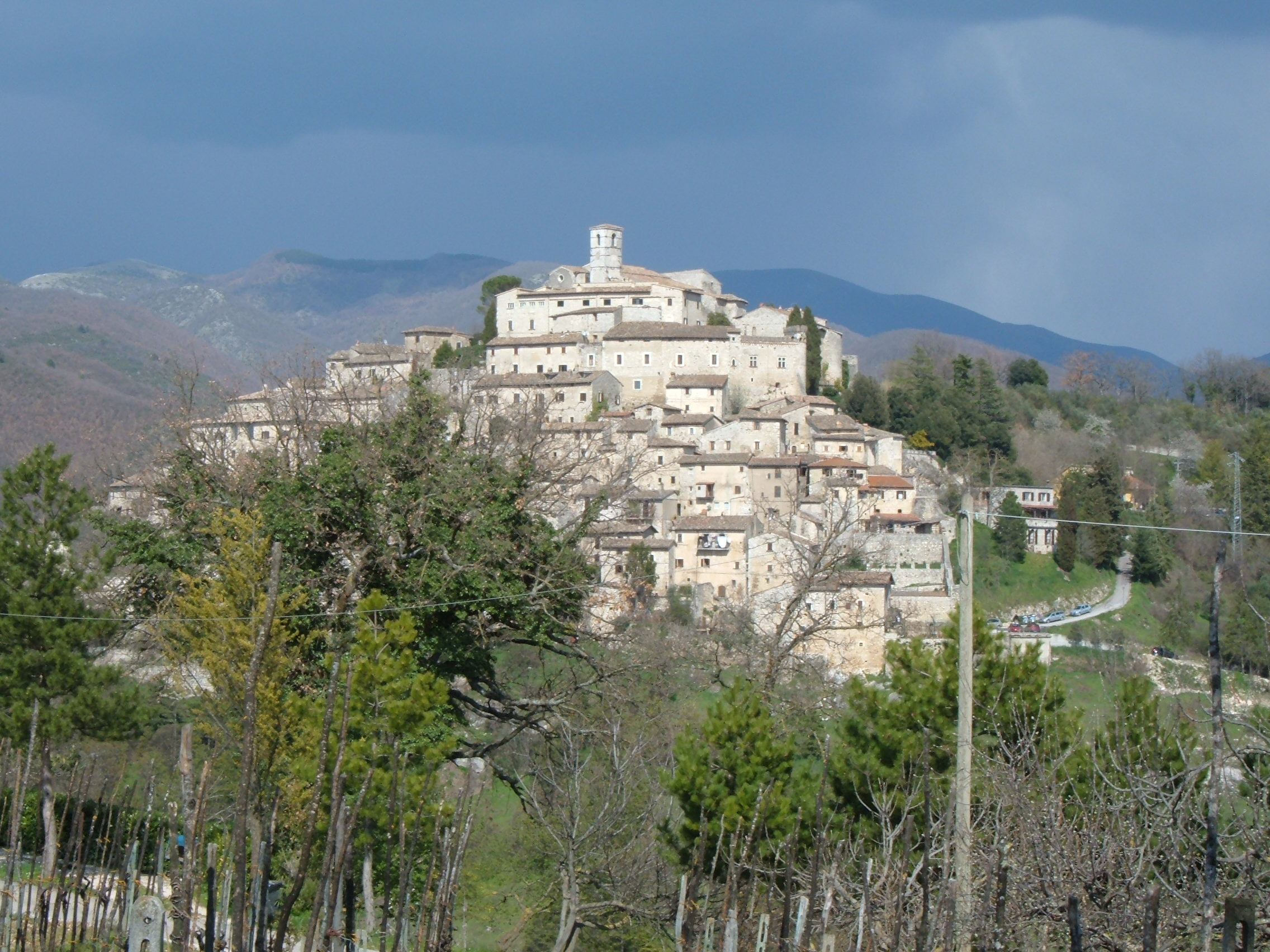 Vista panoramica di Labro (provincia di Rieti)